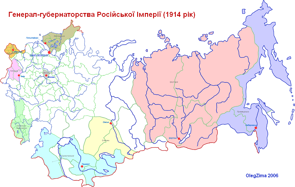 map